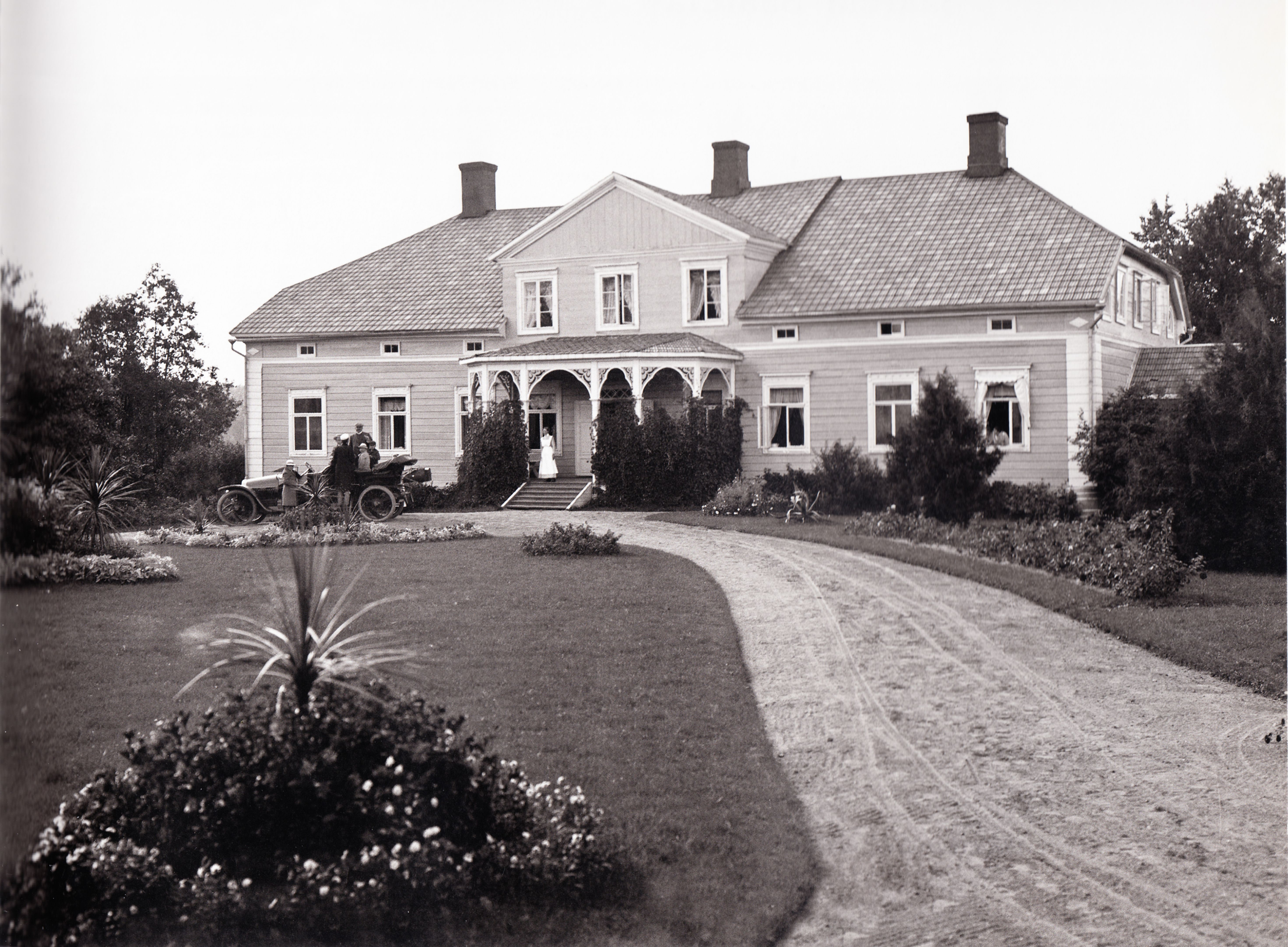 seestan kartano